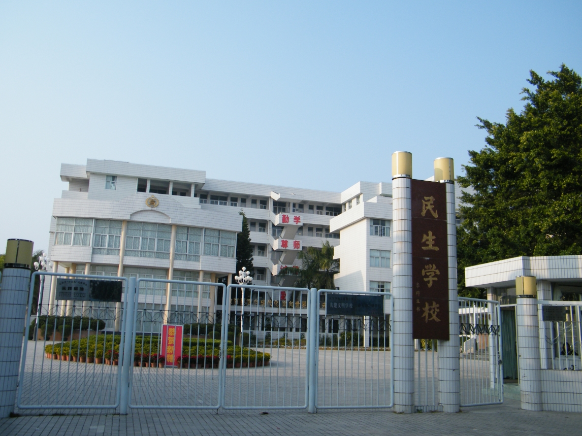 达濠民生学校